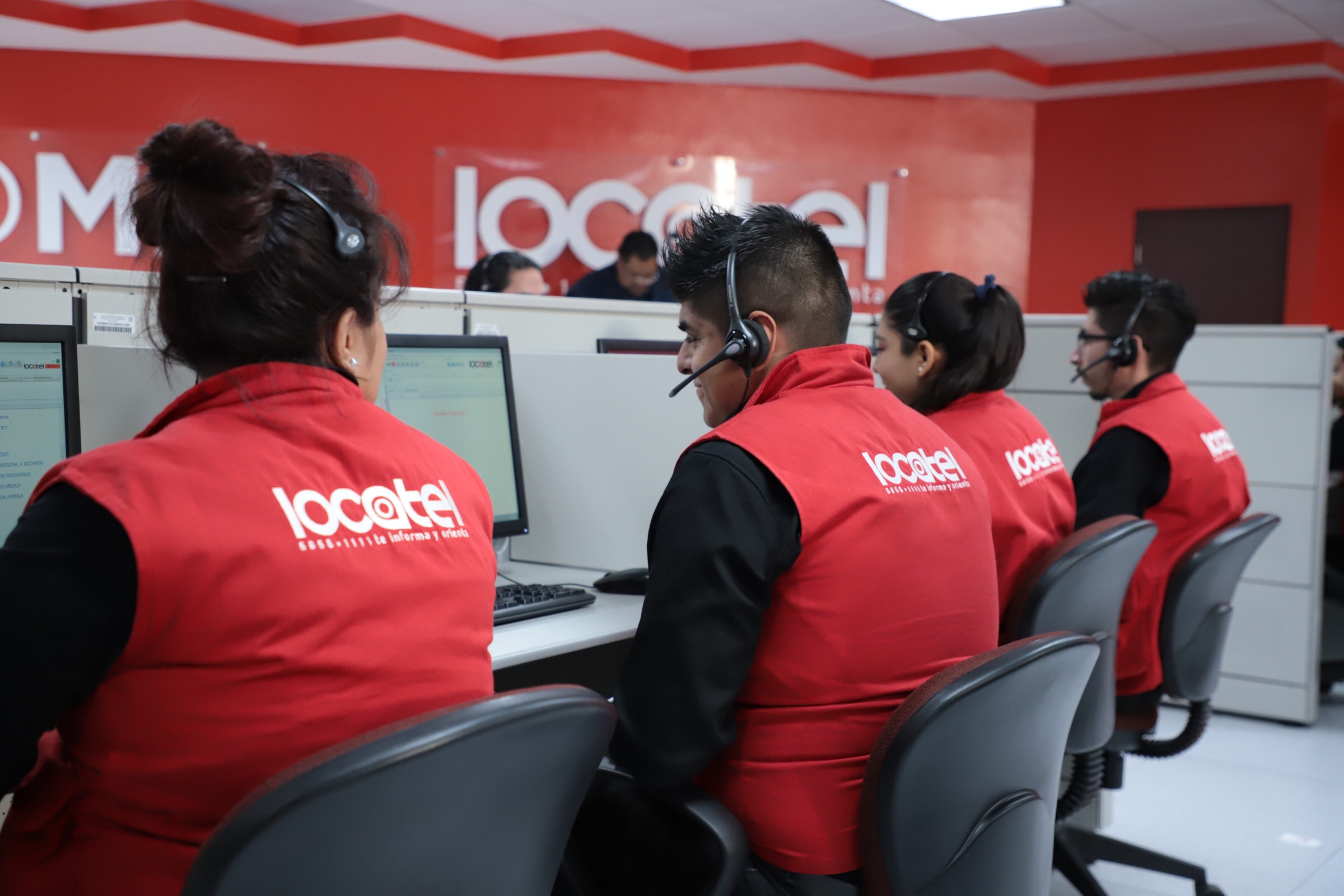 39 Aniversario Locatel, Ciudad de México